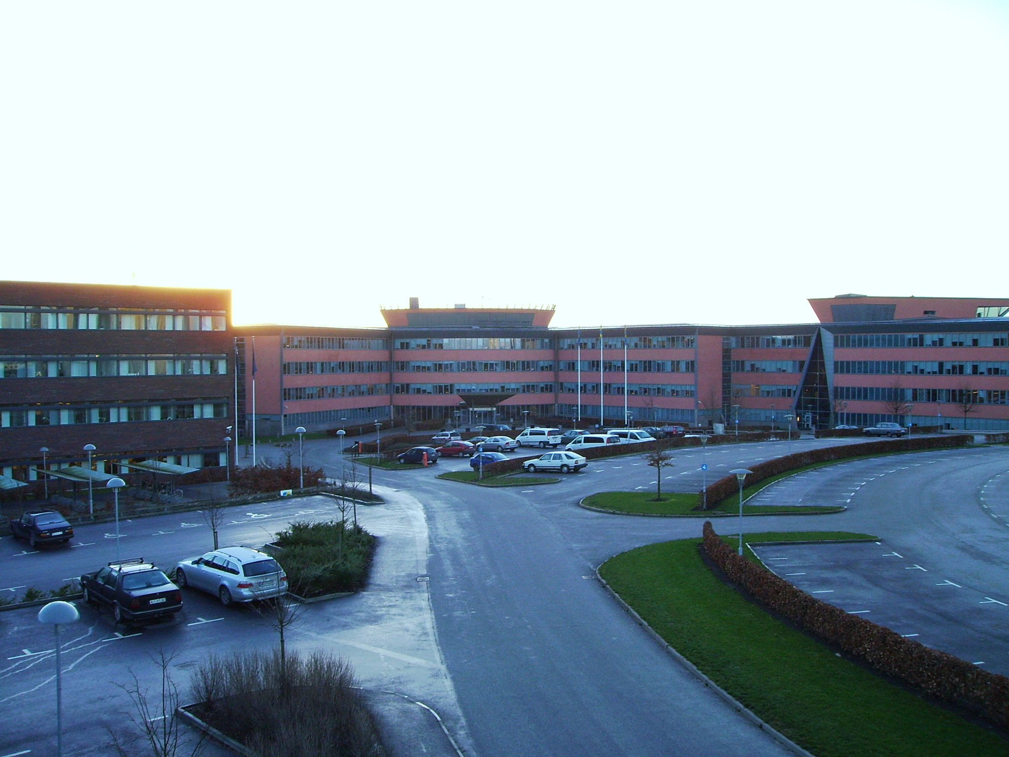 SonyEricsson Standort Lund